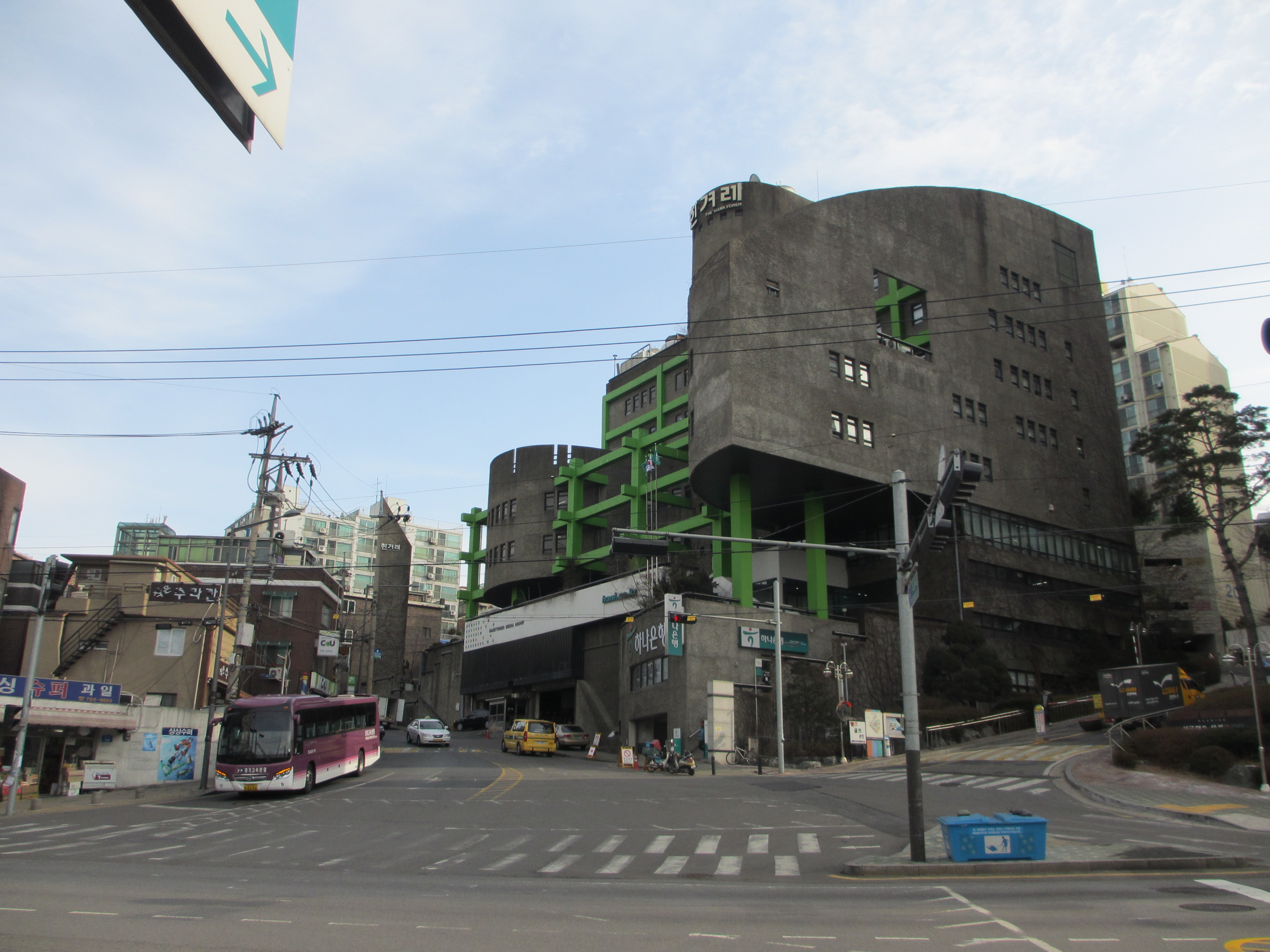 The Hankyoreh building in Mapo-gu, Seoul, South Korea.